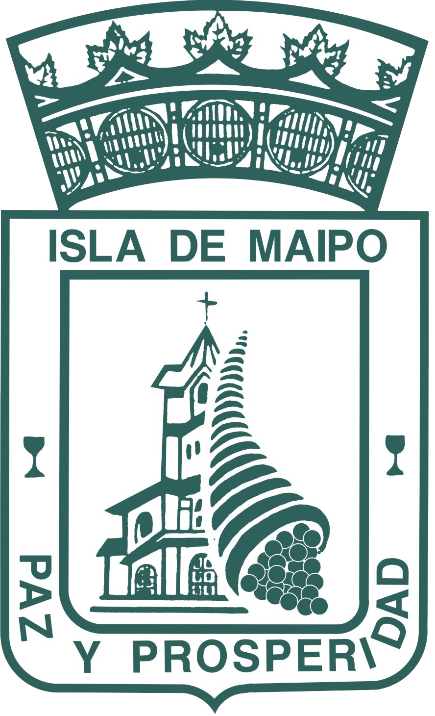 Actual escudo de Isla de Maipo